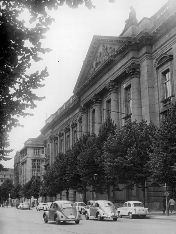 Berlin, Deutsche Staatsbibiliothek ADN-ZB Brüggmann Schm-Qu 17.7.1961 300 Jahre Deutsche Staatsbiliothek Berlin Die Deutsche Staatsbiliothek in Berlin begeht vom 23. - 28. Oktober 1961 ihr 300jähriges Jubiläum. Die Deutsche Staatsbibliothek verfügt gegenwärtig über 1,8 Mill. Bände, darunter eine fast lückenlose Zusammenstellung fachwissenschaftlicher und technischer Bücher und Zeitschriften der verschiedensten Gebiete. Die Musikabteilung ist eine der größten Sammlungen in der Welt. Dort befinden sich u. a. Handschriften von Bach, Beethoven und Mozart. In der Kartenabteilung werden neben Schätzen von historischem Wert auch das größte erhalten gebliebene Buch der Erde aufbewahrt: der Atlas des Kurfürsten Friedrich Wilhelm von Brandenburg aus dem Jahre 1666, der kunstvolle handgezeichnete Karten enthält. UBz: Außenansicht.